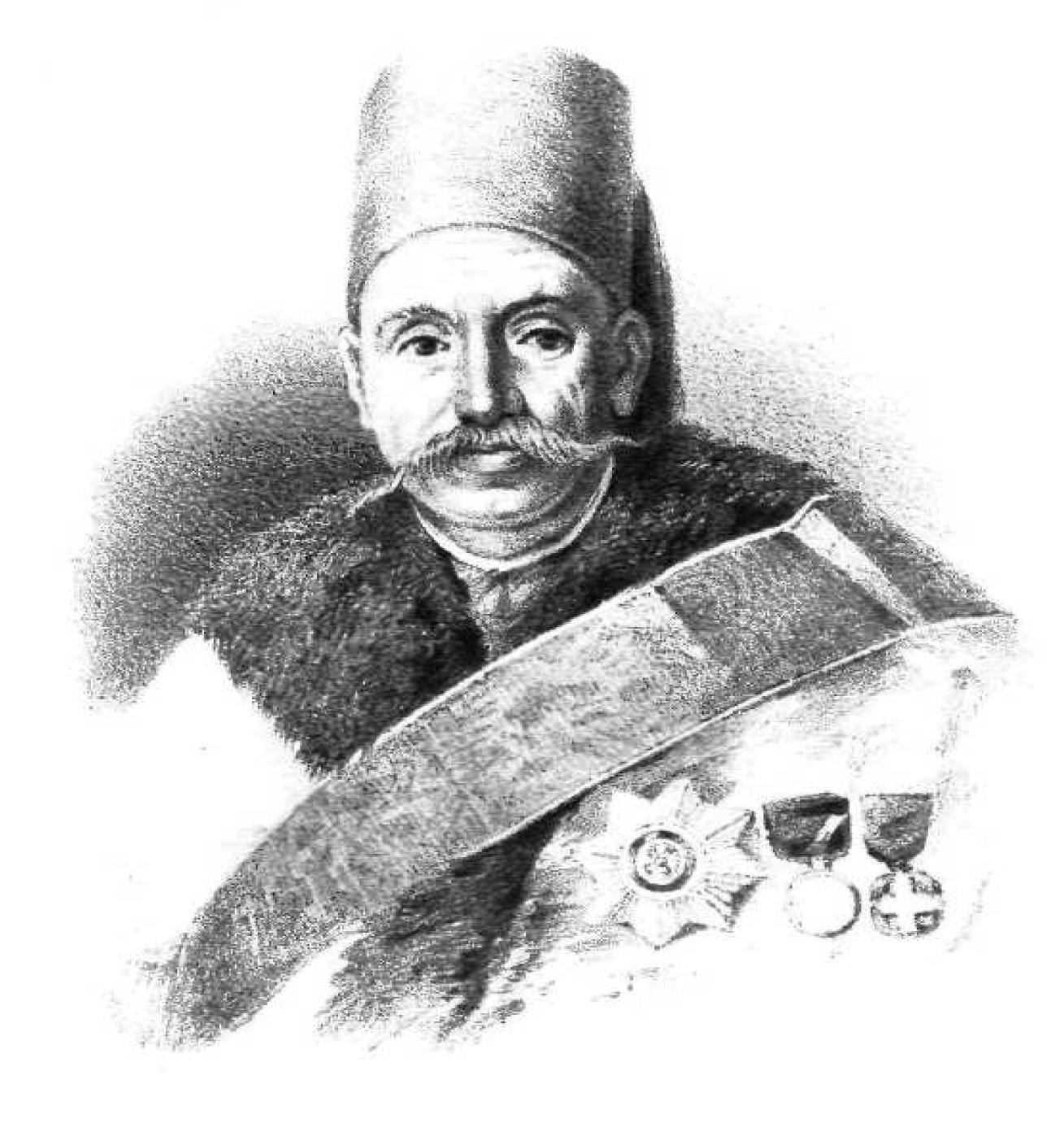 Griechischer Freiheitskämpfer, 19. Jahrhundert